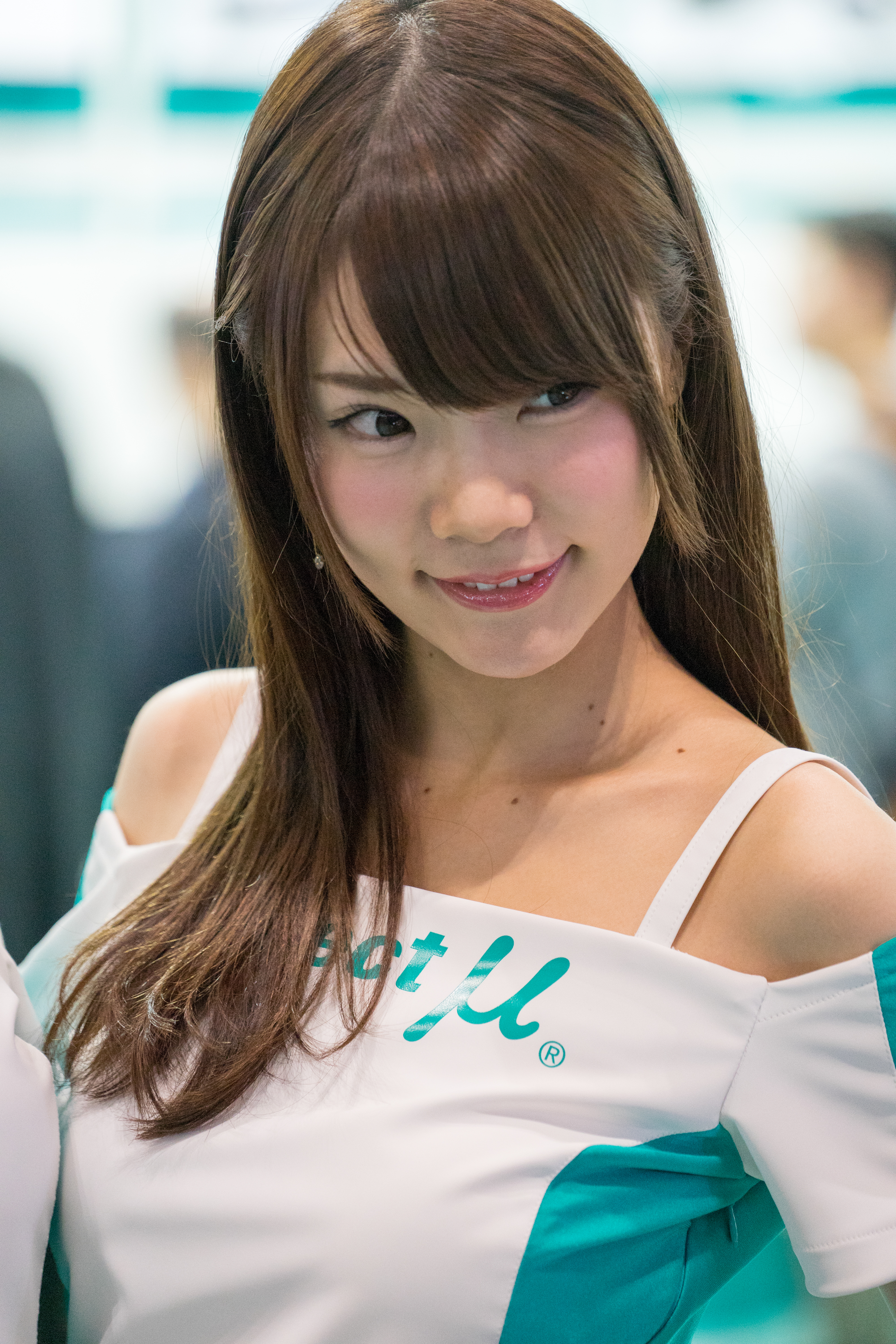 TOKYO AUTO SALON 2017 （東京オートサロン2017）-108.jpg